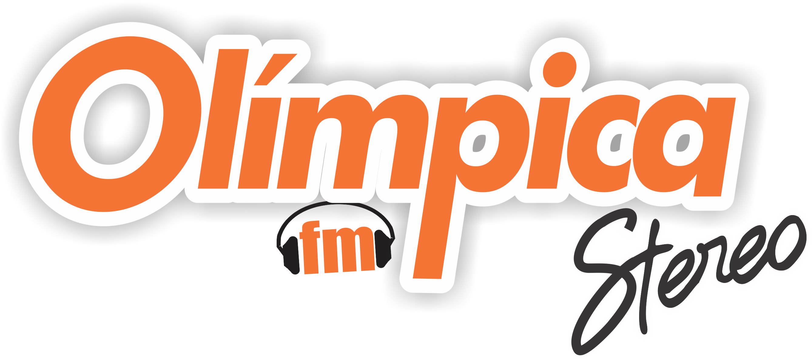 Logo oficial del sistema radial olímpica stereo en Colombia